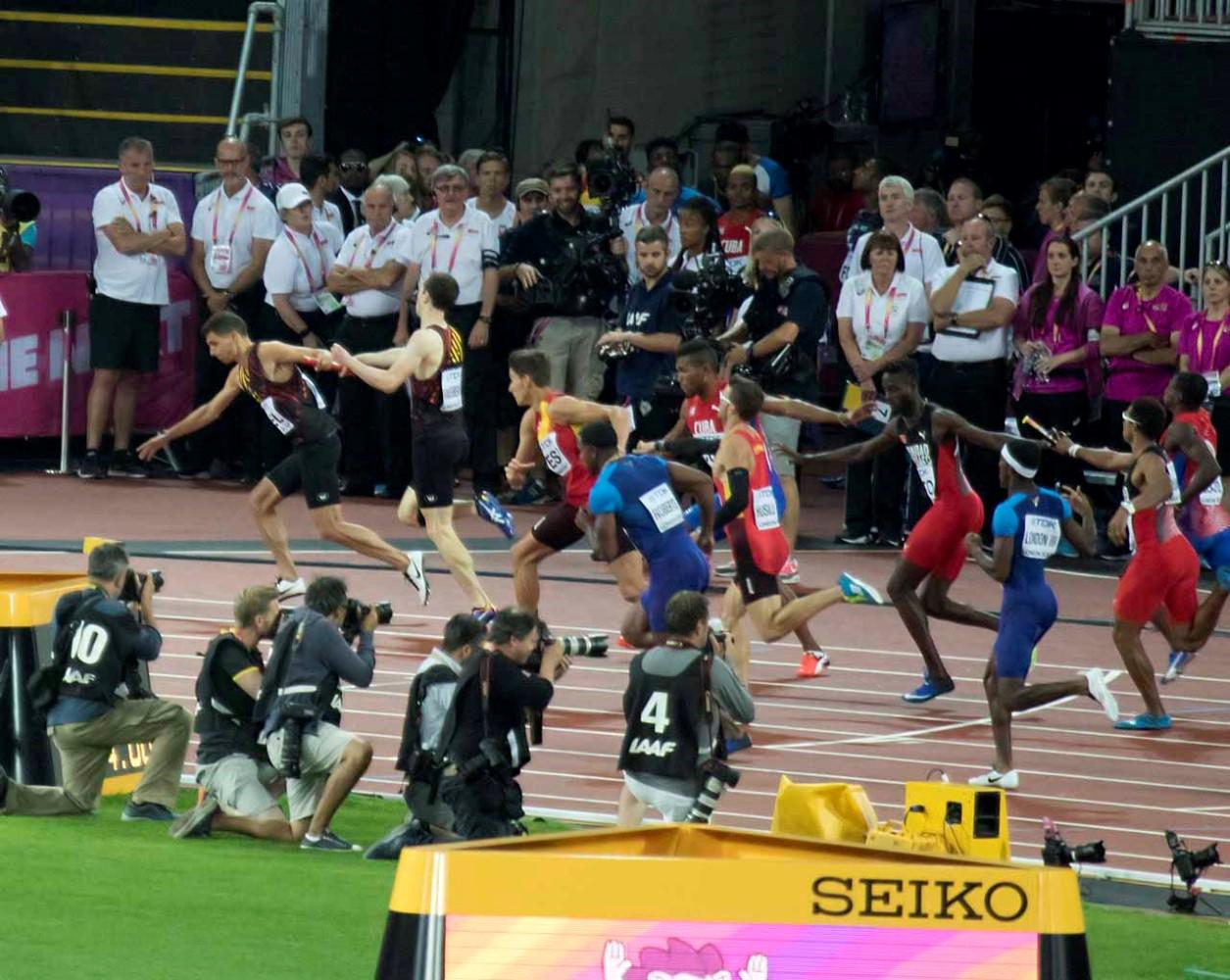 d9_15 finale 4x400m team belgium